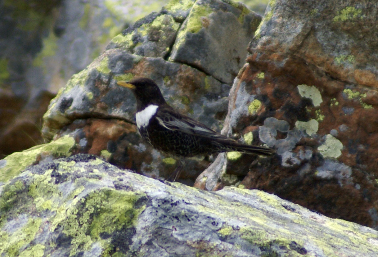 Ring Ouzel Turdus torquatus alpestris. Pyrenees.